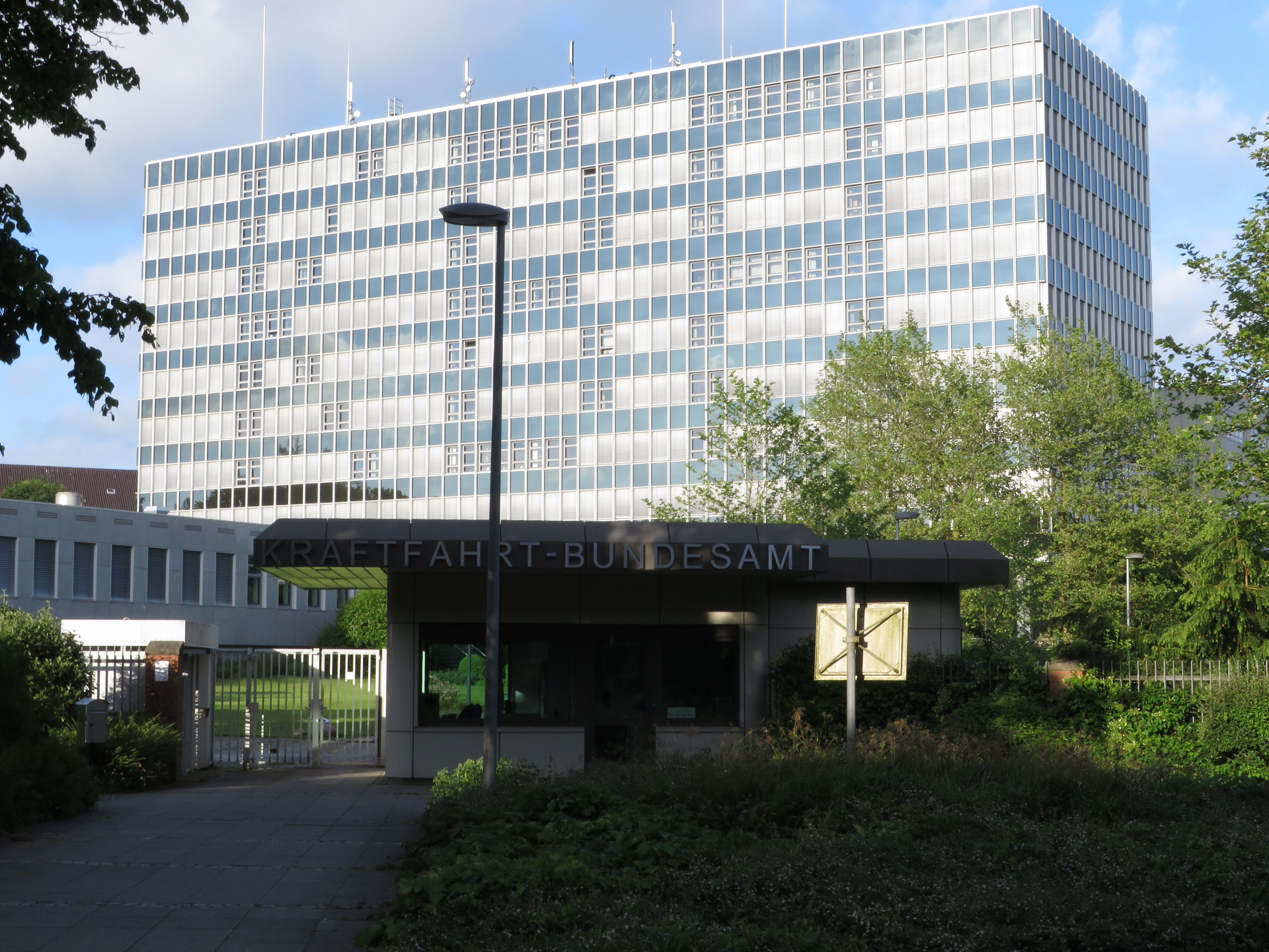 Kraftfahrt-Bundesamt (Fenster mit Rollos bilden an dem Tag Abkürzung KBA), Flensburg-Mürwik Mai 2014, Bild 07